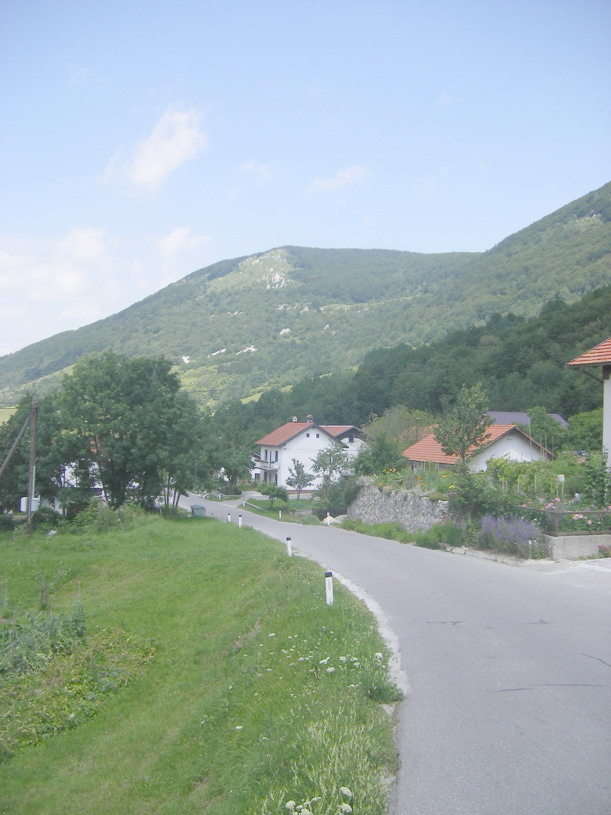 Podkraj (Ajdovščina municipality)